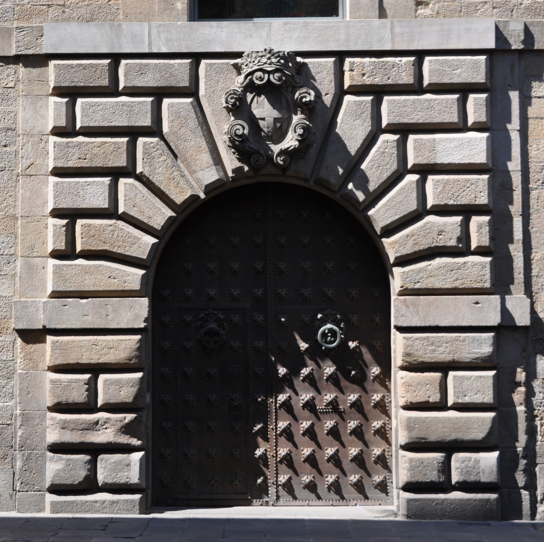 Barcelona. Generalitat Palace. Door to Carrer del Bisbe. C. 1638. Pere Pau Ferrer, architect.